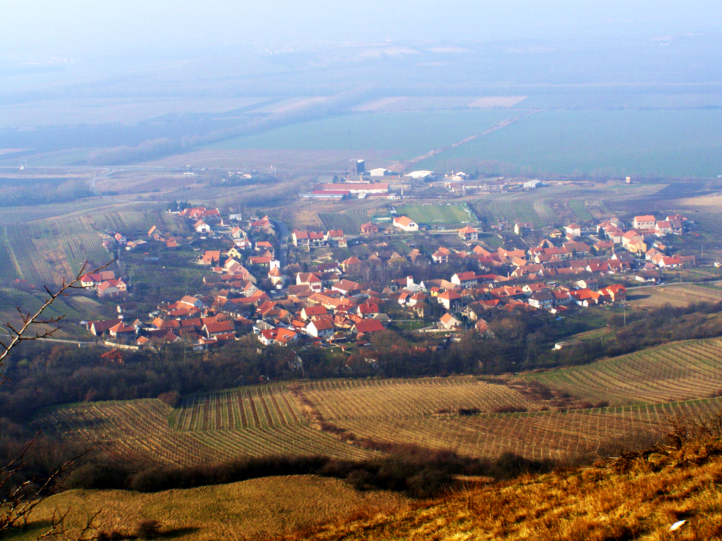 Bavory, pohled ze Stolové hory